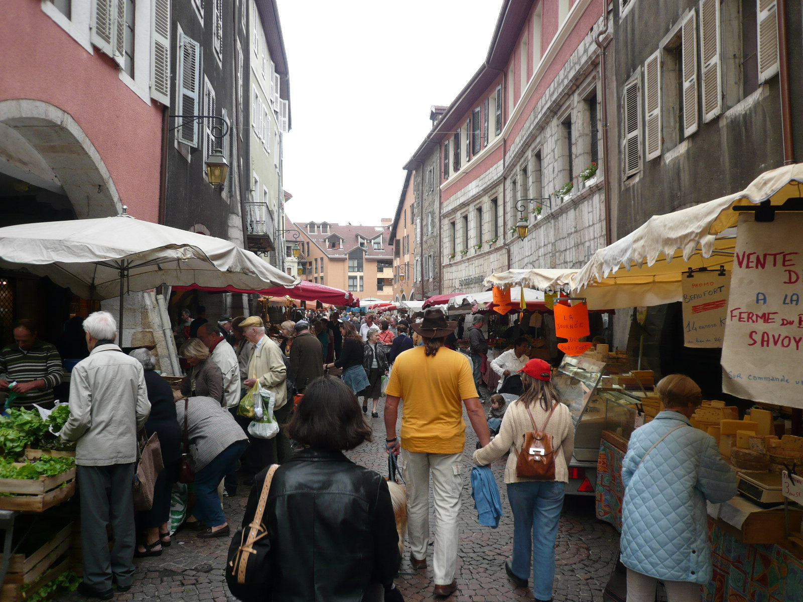 Marché d'Annecy